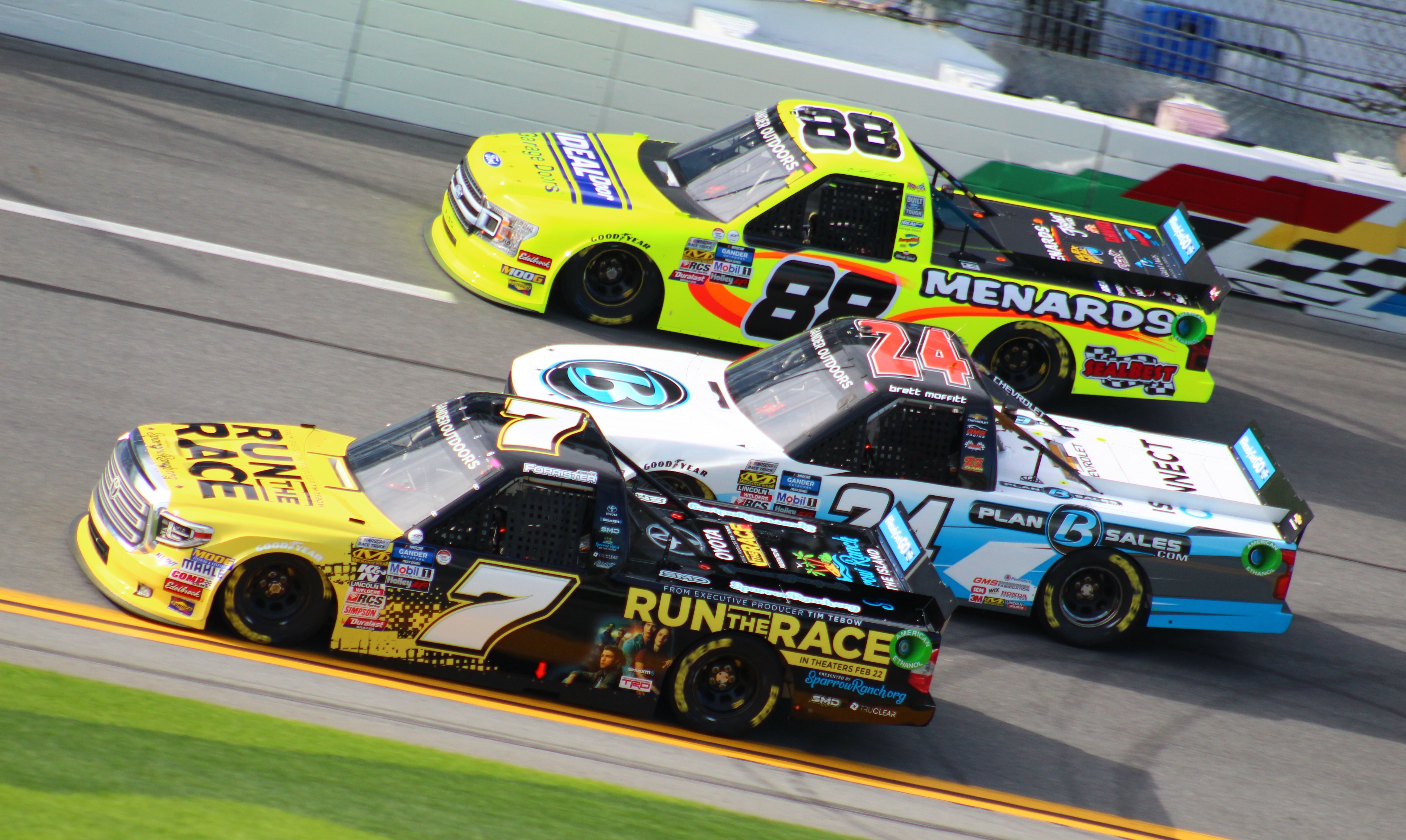 2019 Daytona 500